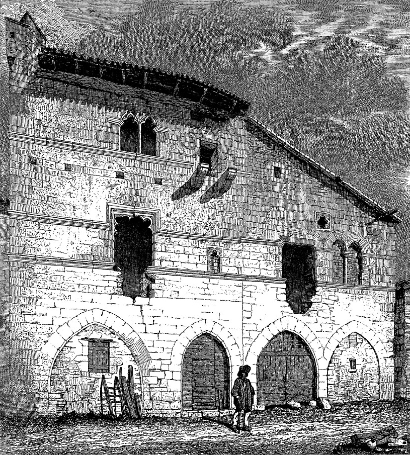 Monpazier - Maison du chapitre par Léo Drouyn (Le Croniqueyr du Périgord et du Limousin - 1854 - p. 144)